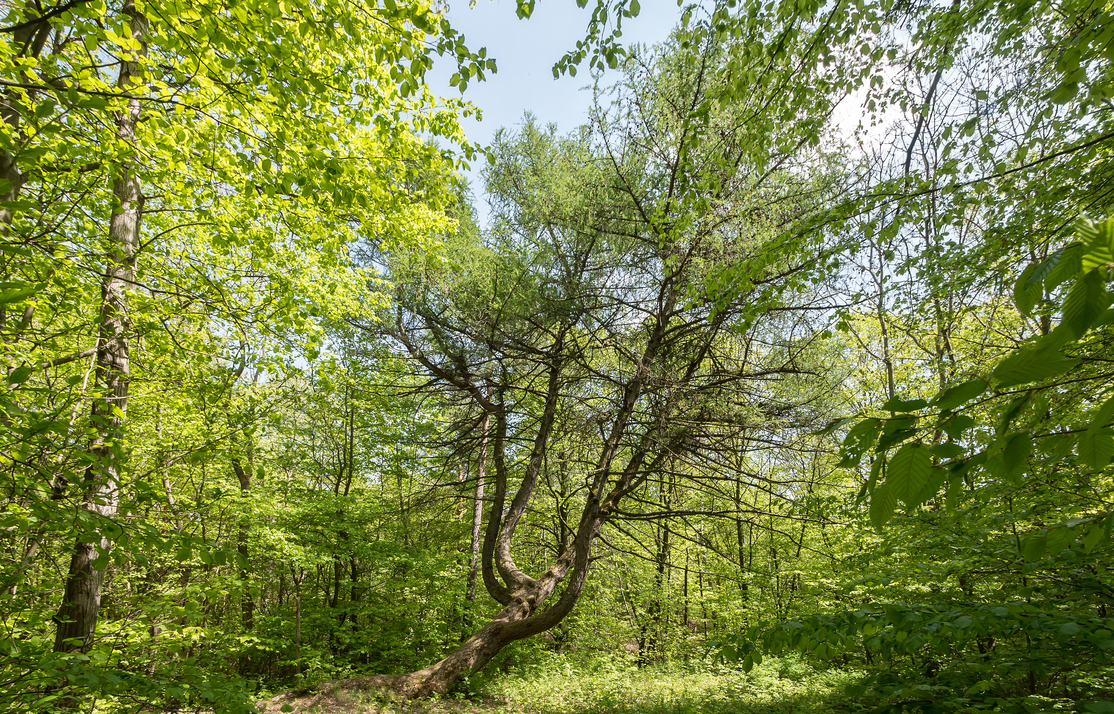 Kandelaber-Lärche Doc.-Nr. 1963-08 Jena III